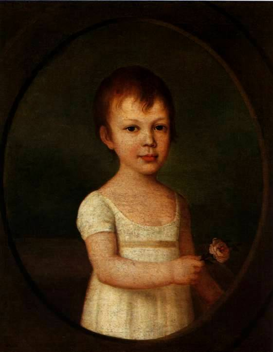 Портрет Елизаветы Петровны Коновницыной (1802-1867) в детстве Неизвестный художник начала 19 века Портрет графини Елизаветы Петровны Коновницыной в детстве. 1800-ыe Графиня Е.П. Коновницына (1801 или 1804—1867) — дочь героя Отечественной войны 1812 года П.П. Коновницына. Год ее рождения обычно указывается как 1801, однако в надписи на обороте портрета, сделанной ее дедом с материнской стороны, упомянуто, что его „внука" родилась в 1804. Декабрист А.Е. Розен писал о ее приезде в Читу в 1827 году: „От роду было ей 23 года; единственная дочь героя- отца и примерной матери, урожденной Корсаковой, она в родном доме значила все, и все исполняли ее желания и прихоти. Коновницына хорошо пела музицировала и рисовала. В 1823 году она вышла замуж за декабриста, члена Северного общества Михаила Михайловича Нарышкина. В 1827 последовала за мужем в Сибирь, жила в Чите, с 1830 в Петровском заводе. С 1833 — после и выхода его на поселение — жила в Кургане, много помогала местным жителям деньгами и лекарствами Умерла в Москве, где провела последние годы жизни.